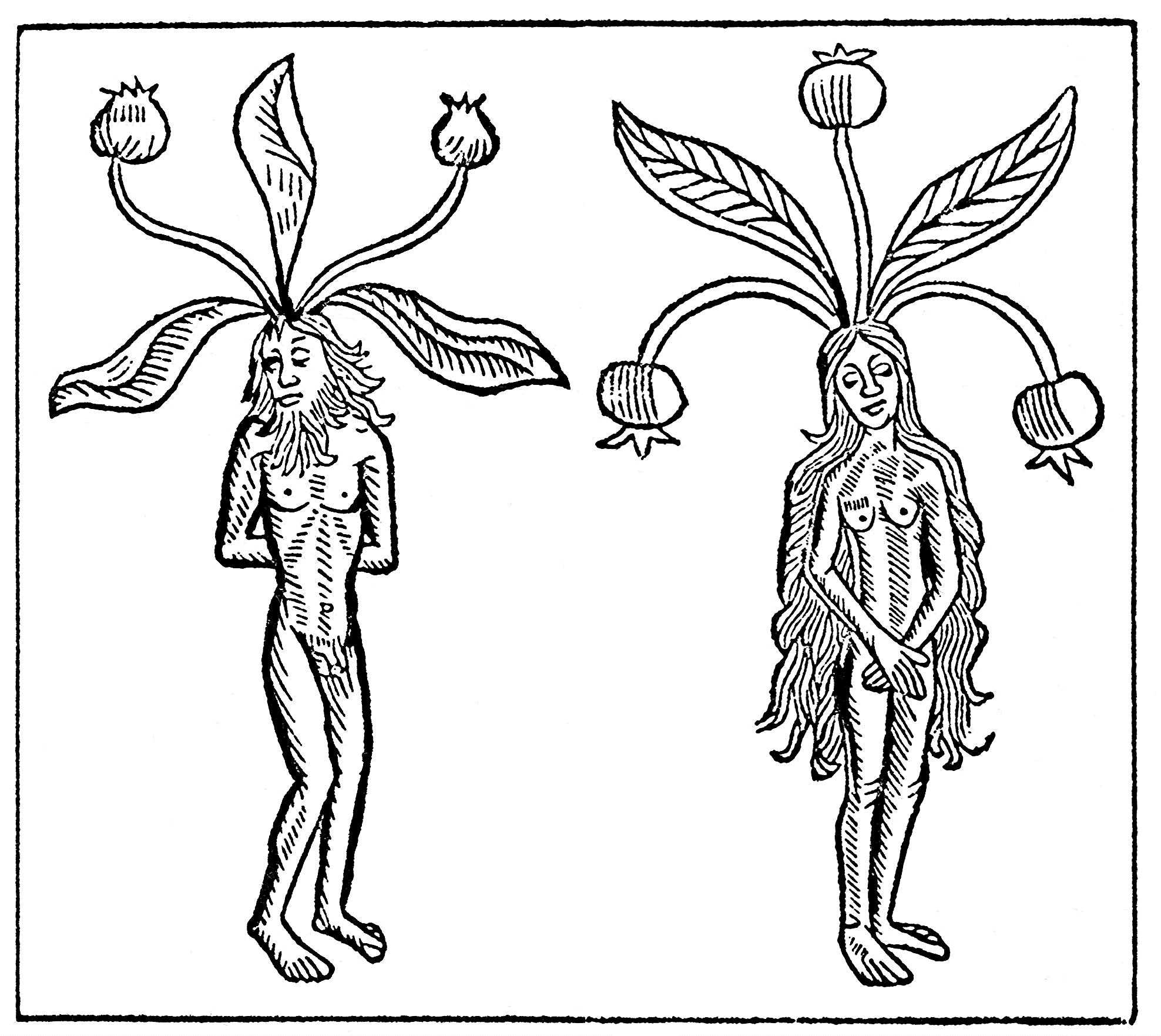 Eine männliche und eine weibliche Alraune. Holzschnitt aus dem Hortus sanitatis des Johannes de Cuba